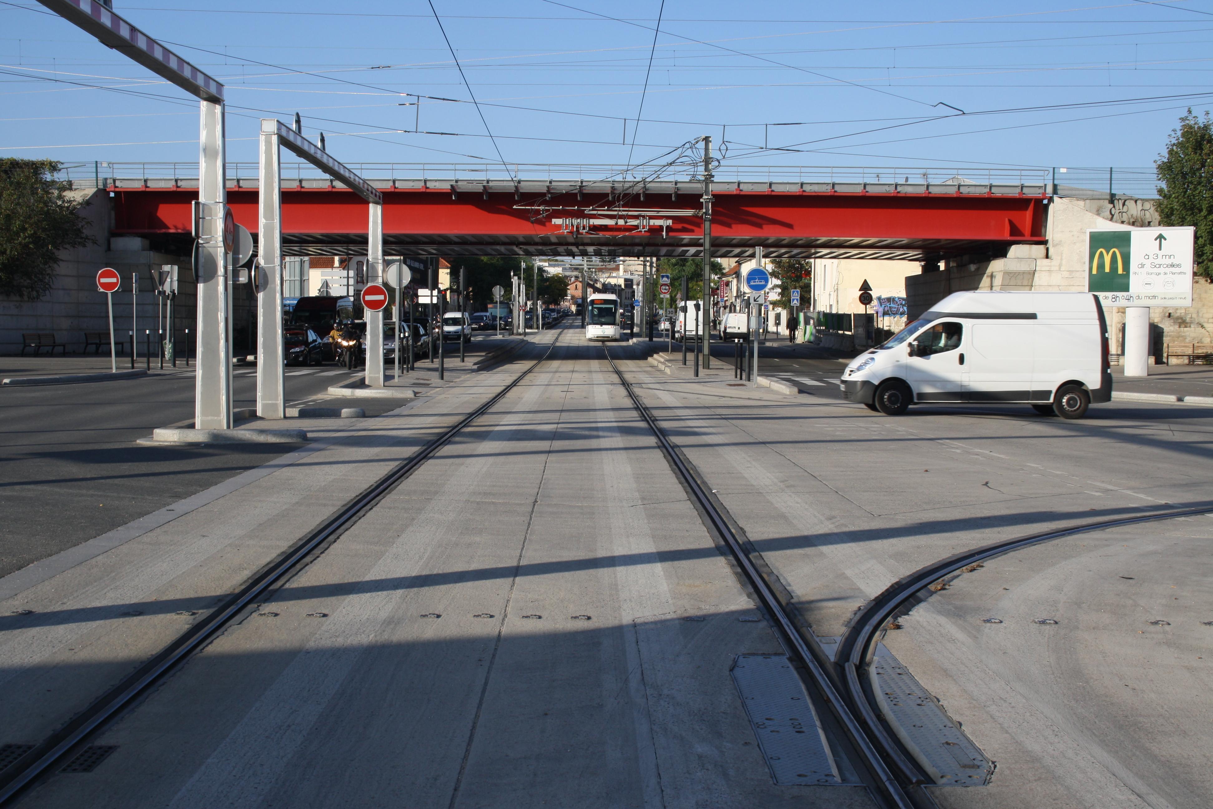 Translohr in Pierrefitte bei Paris